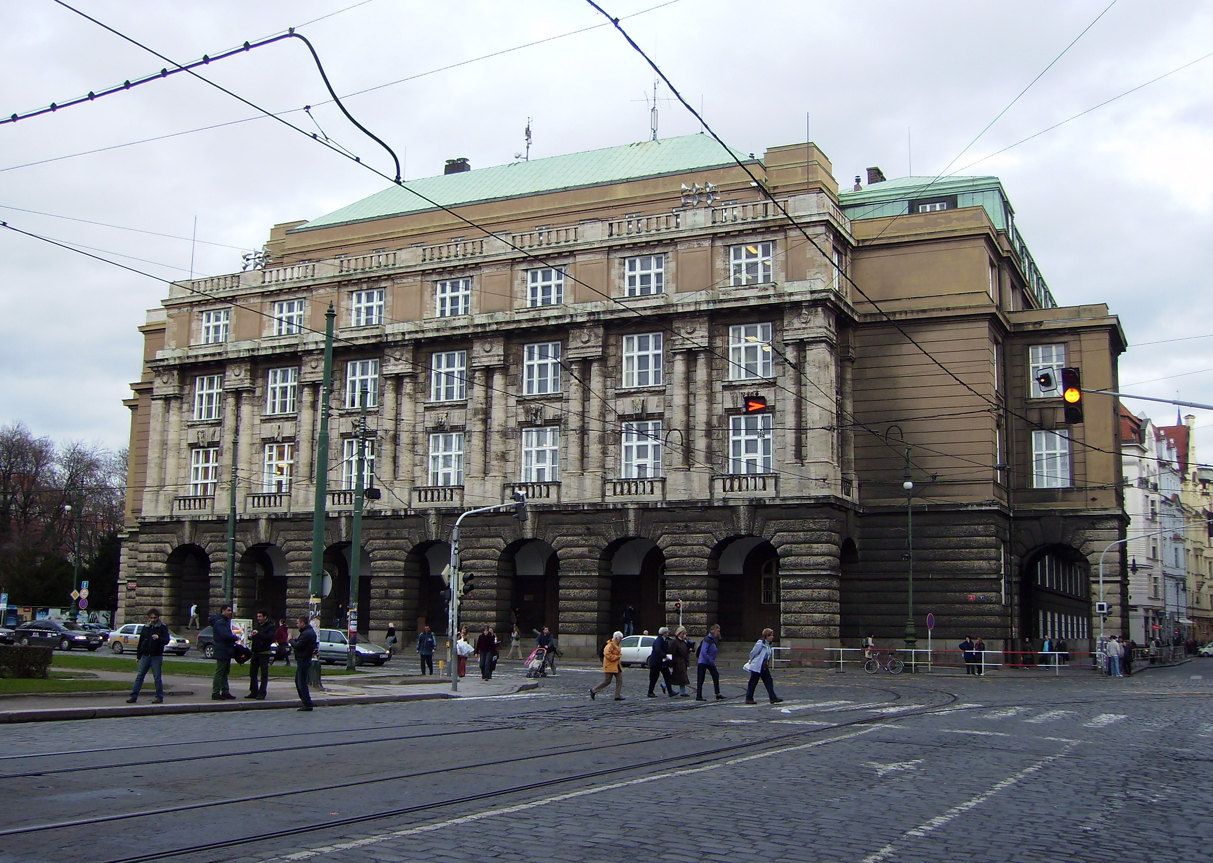 Budova Filozofické fakulty Univerzity Karlovy v Praze na náměstí Jana Palacha.